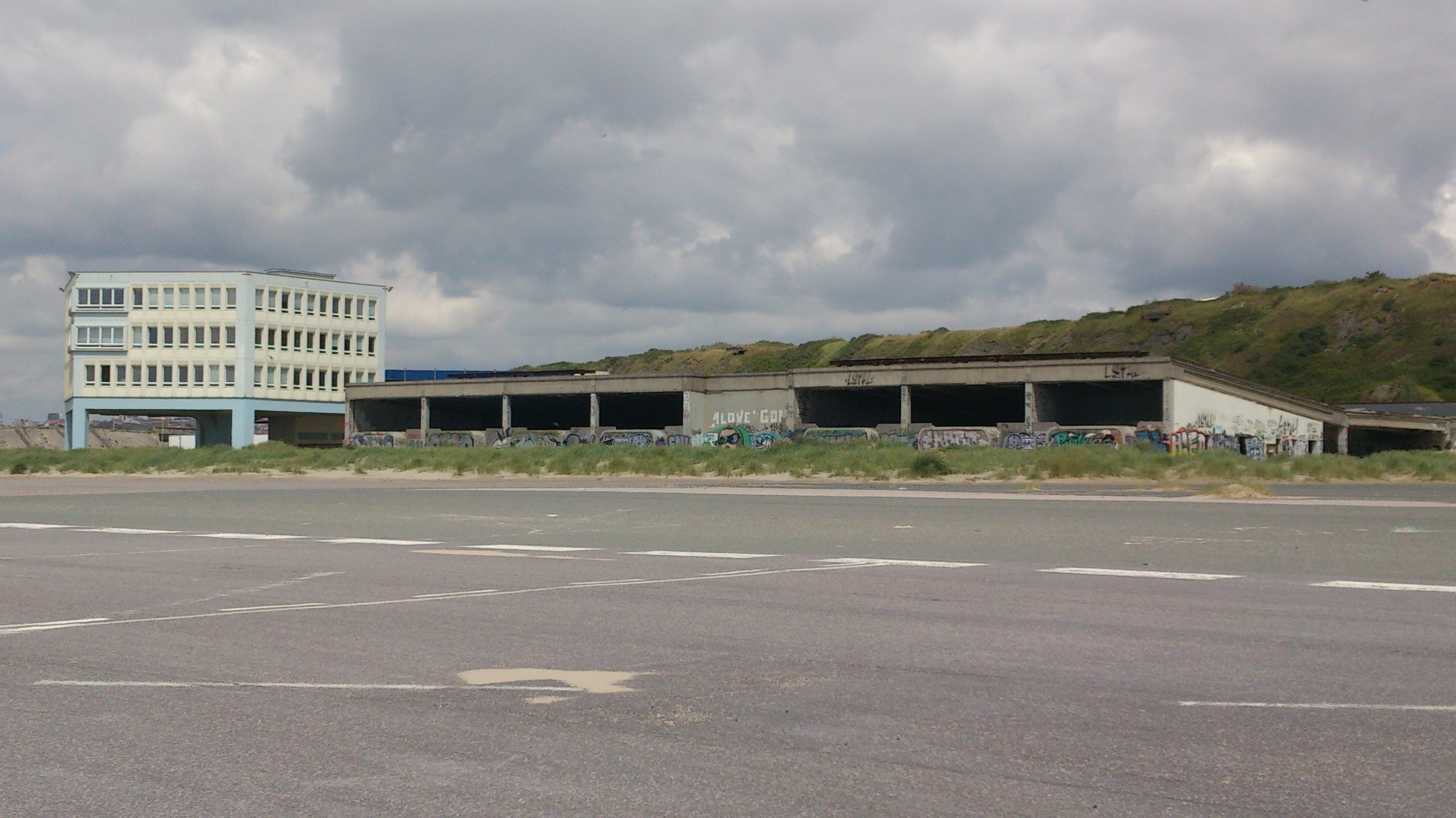 Ancien Hoverport de Boulogne (Le Portel, Pas-de-Calais, Nord-Pas-de-Calais, France).